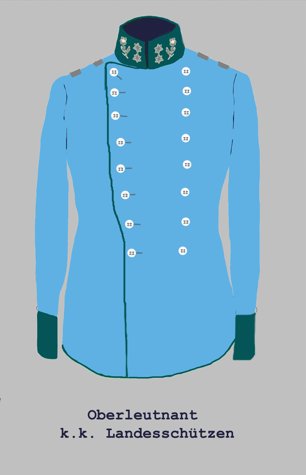 Dienstadjustierung eines Oberleutnant der k.k. Landesschützen (Regiment "Bozen" Nr II)